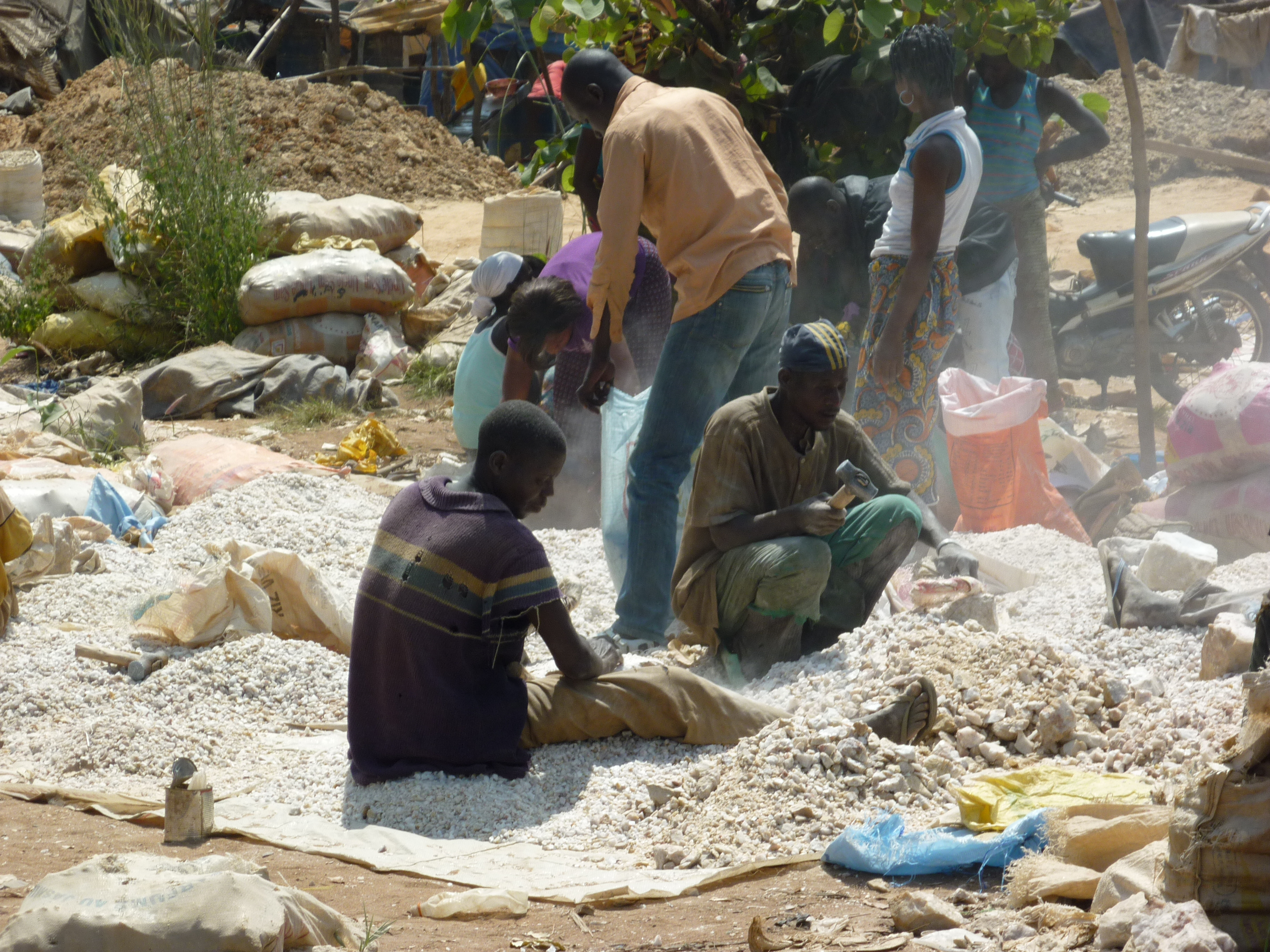 Espace de concassage de gravier par des hommes et femmes dans une zone rurale de la Côte d'Ivoire. This is an image of "African people at work" from Ivory Coast